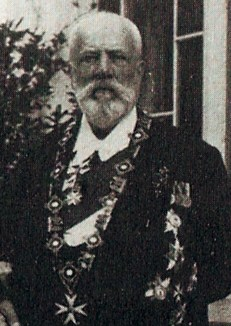 Ernst-Matthias von Köller (1841-1928), preußischer Staatsminister